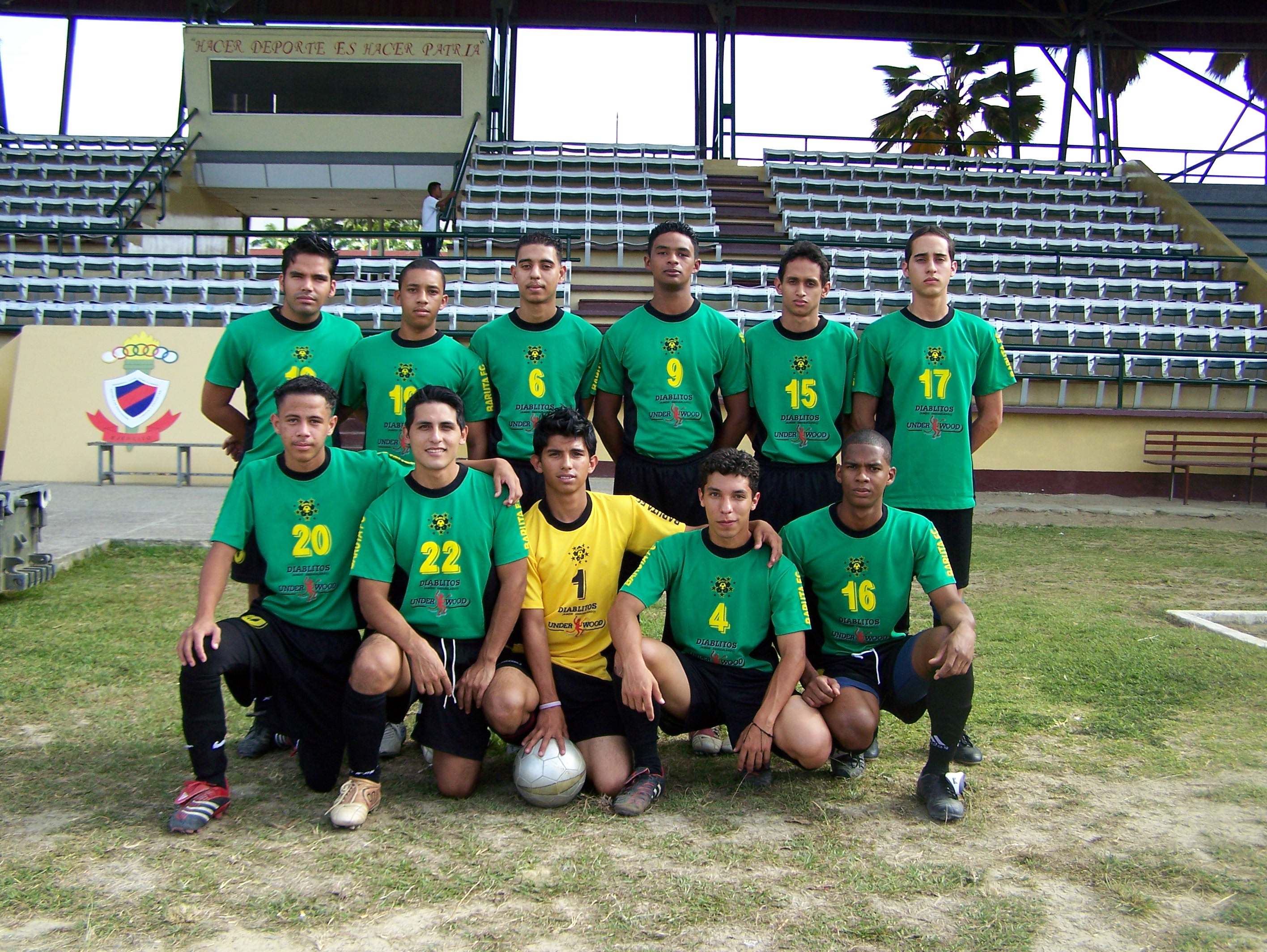 Foto del Baruta Futbol Club, año 2008